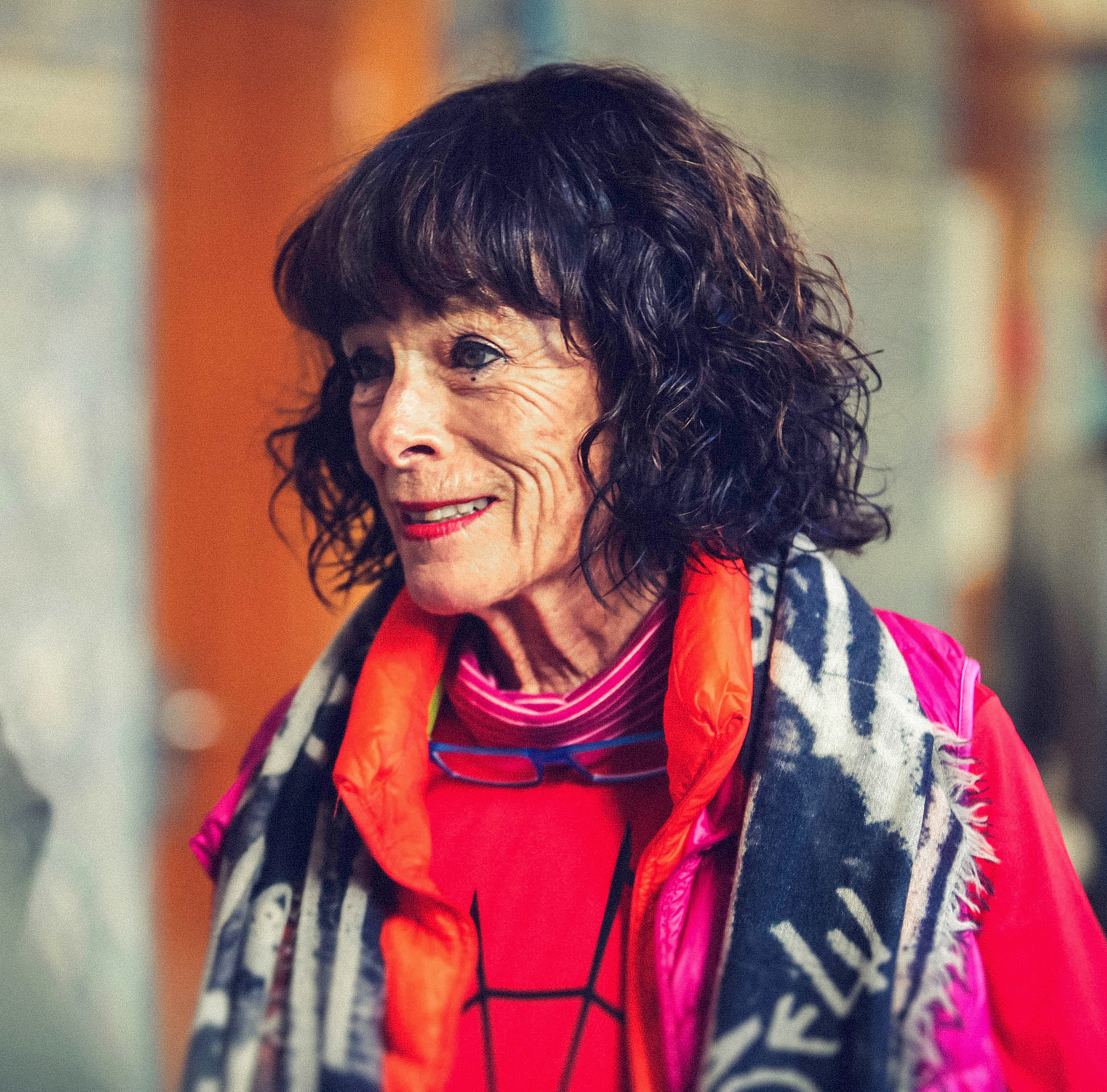 Geraldine Chaplin en Seminci 2016